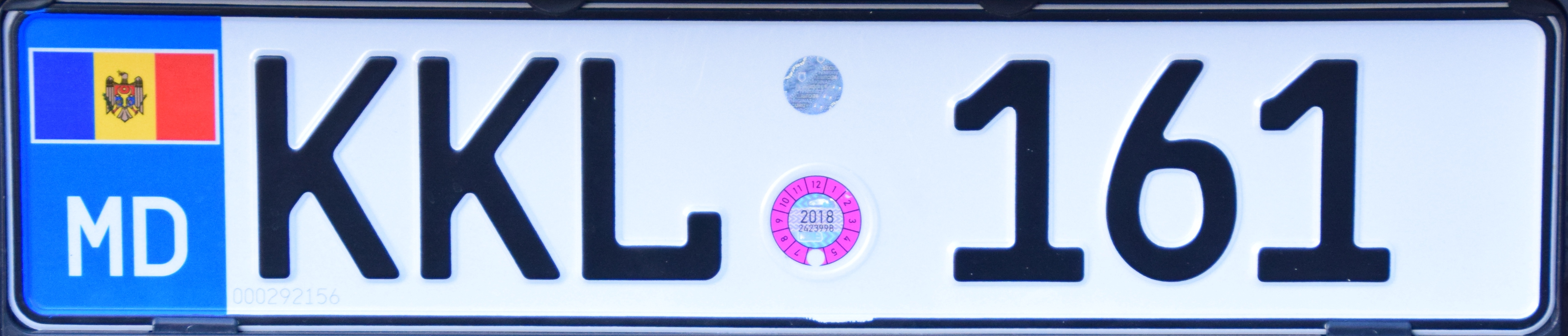 Kentekenplaat Moldavië